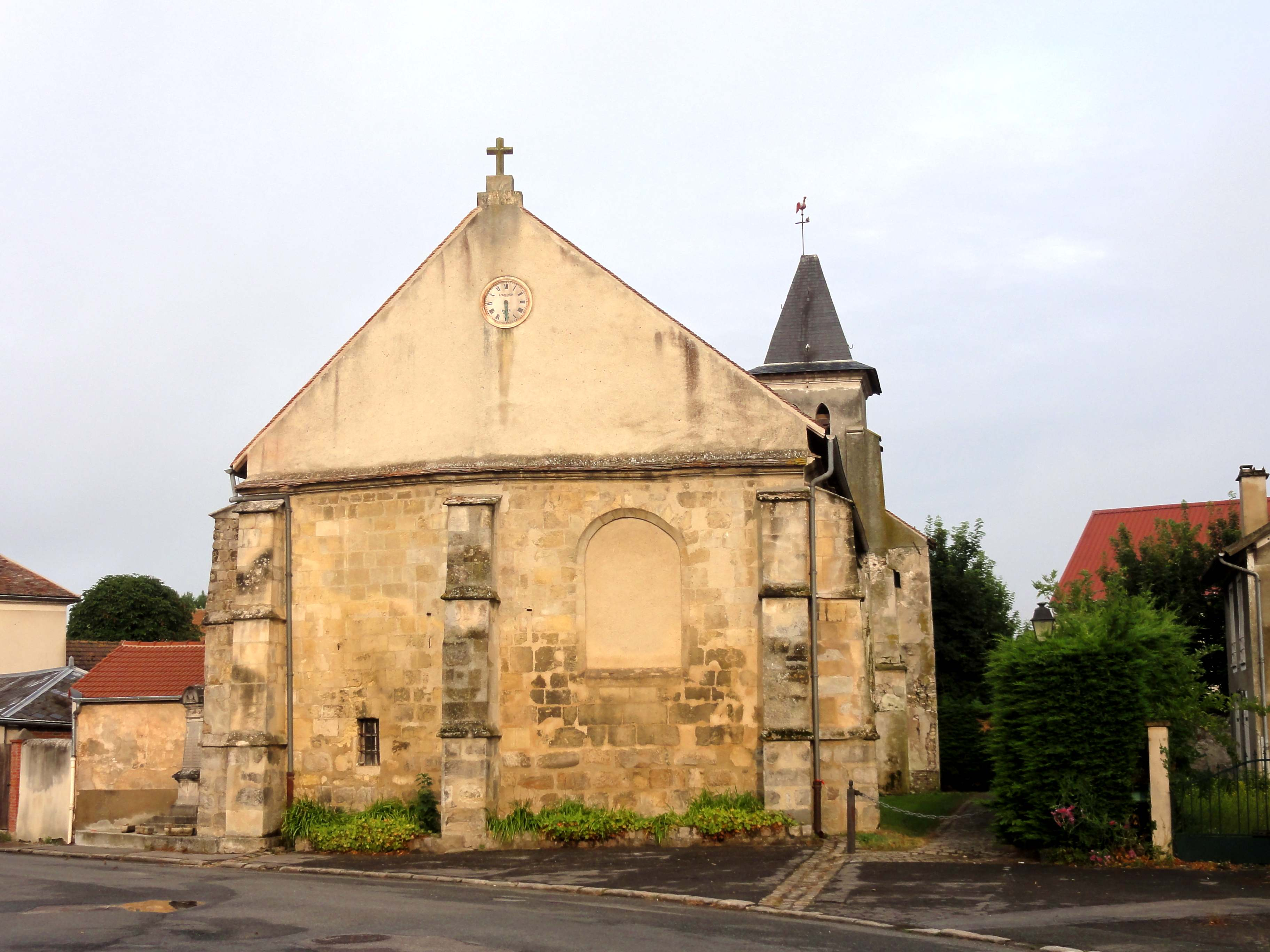 L'église Saint-Thomas-de-Cantorbéry à double nef, inaugurée en 1567. Le chevet plat et aveugle est la seule des quatre élévations qui est bien dégagée. L'étroit chemin à droite de l'église mène au portail sur la façade ouest.